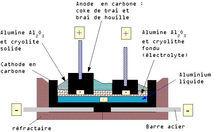 Schéma de principe de la production d'aluminium par le procédé Héroult-Hall